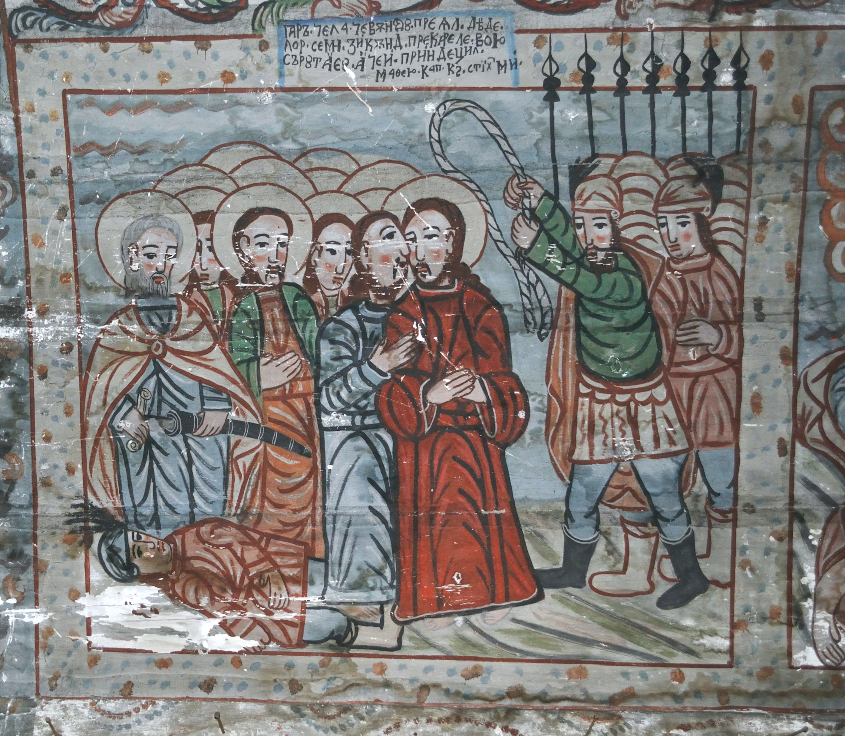 Biserica de lemn din Agârbiciu, județul Cluj